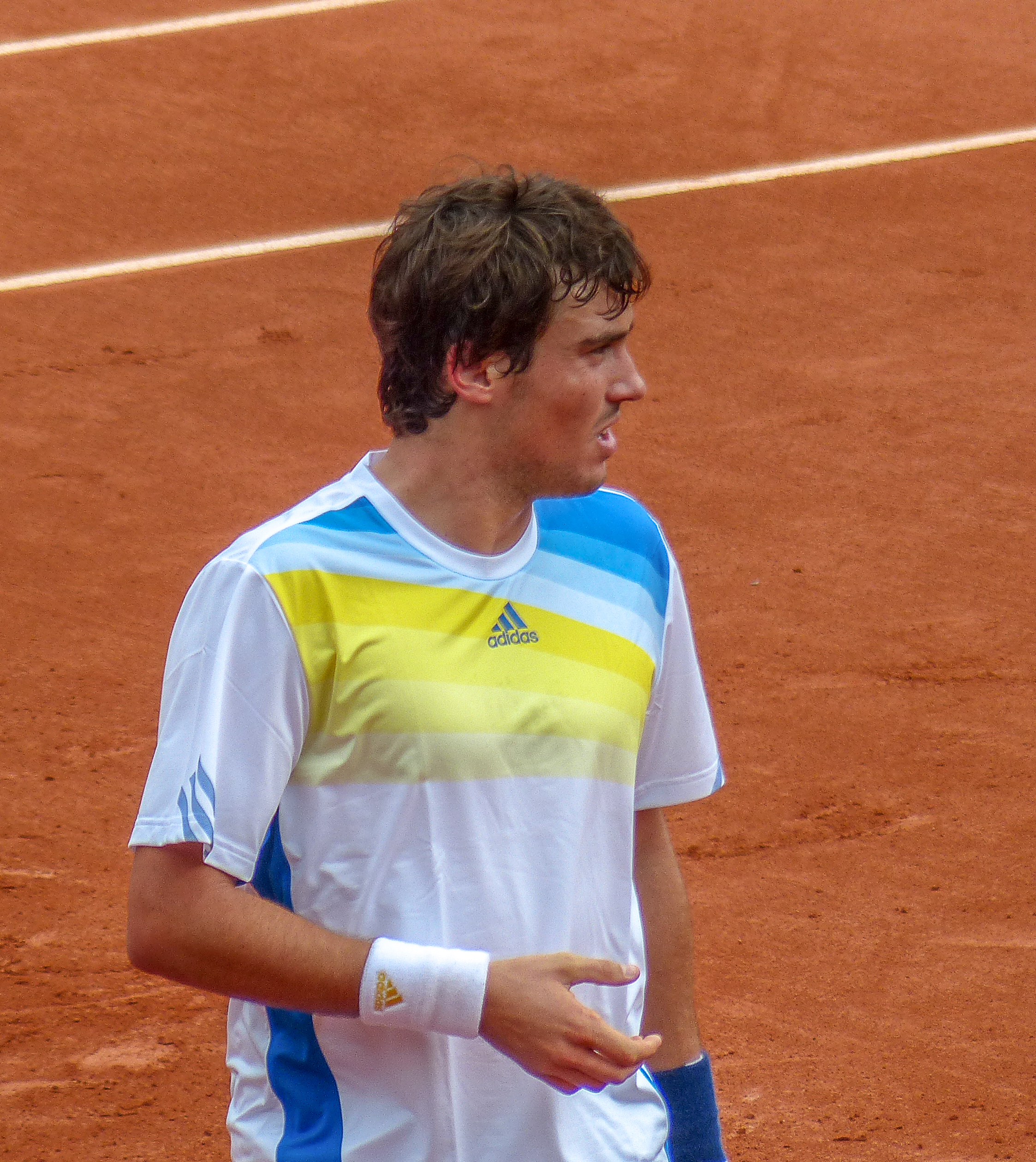 2ème tour Roland Garros 2013 : Novak Djokovic (SRB) def. Guido Pella (ARG)